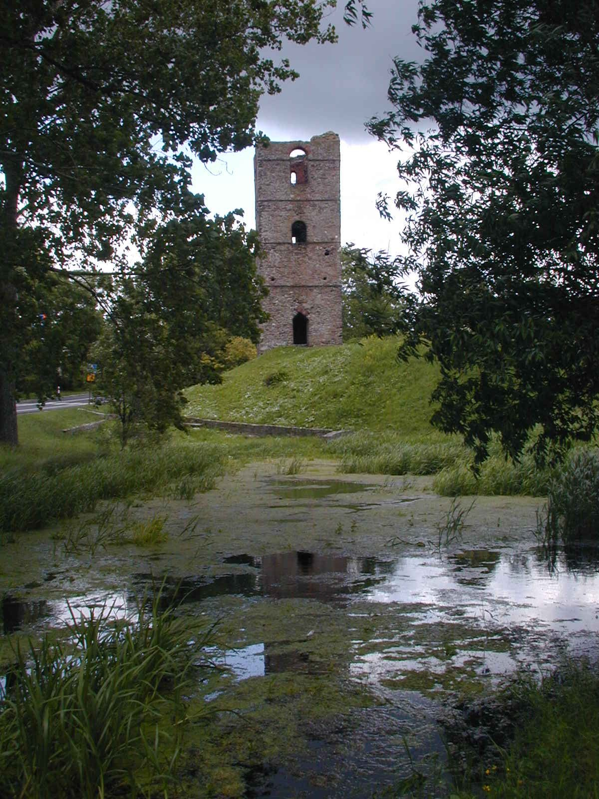 Stołpie - ruiny wieży obronnej i wzgórze (zabytek nr rejestr. A/65 z 26.05.1956)